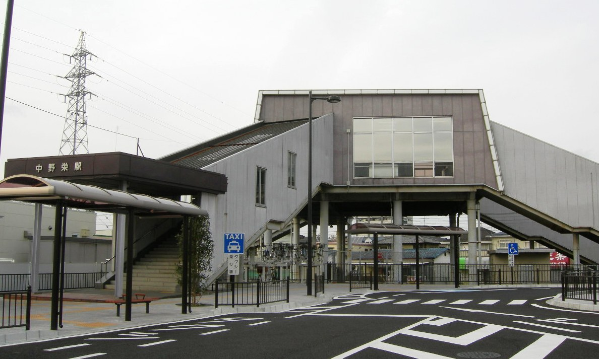 JR仙石線（JR senseki line）中野栄駅（Nakanosakae station）駅舎（南側）